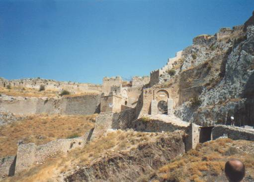 Fortificación bizantina del Acrocorinto, en la ciudad de Corinto (Grecia)Byzantine fortifications on Acrocorinth